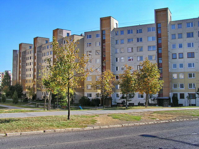 KVP